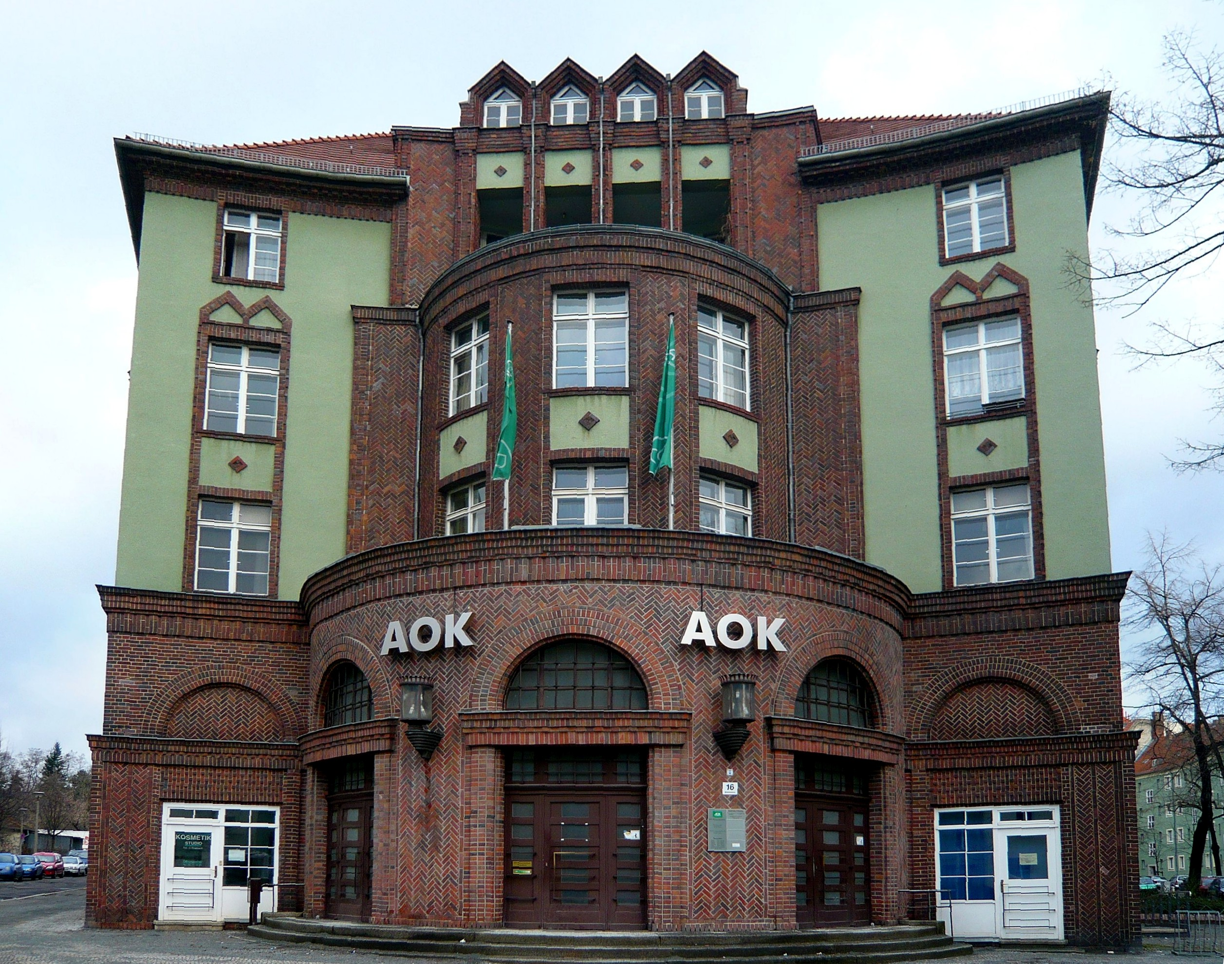 Straße in Lichtenberg: Deutschmeisterstraße